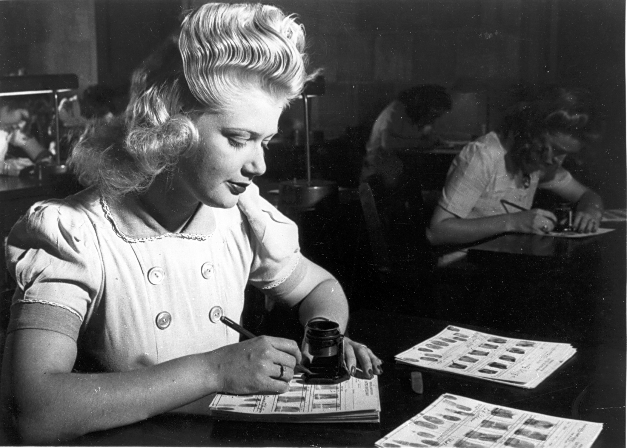 FBI Fingerprint experts.